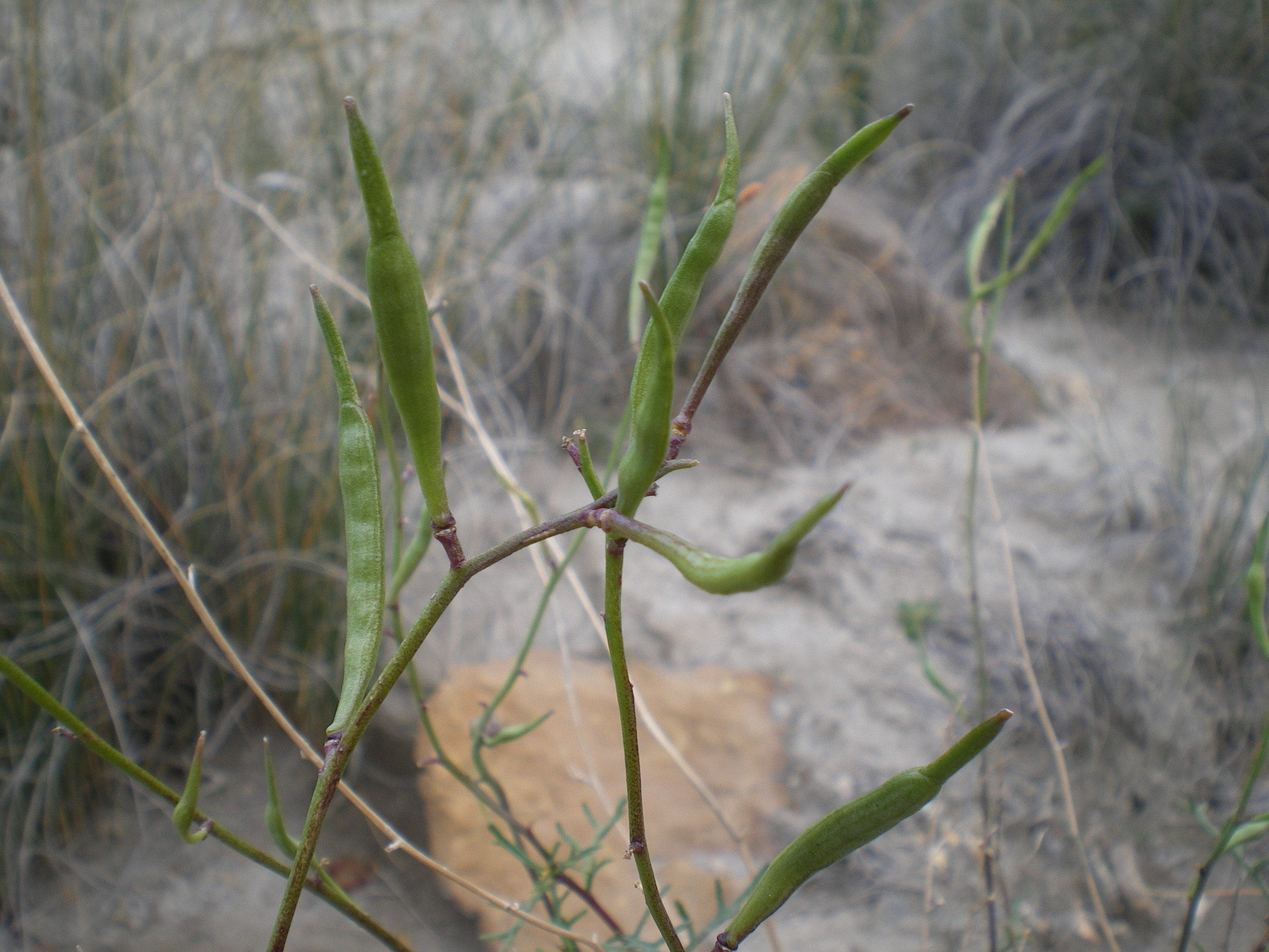 Fruto en forma de silicua, aún verde, de Euzomodendron bourgeanum, endemismo almeriense del subdesierto de Tabernas.